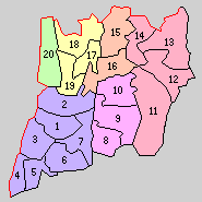 栃木県芳賀郡の町村。